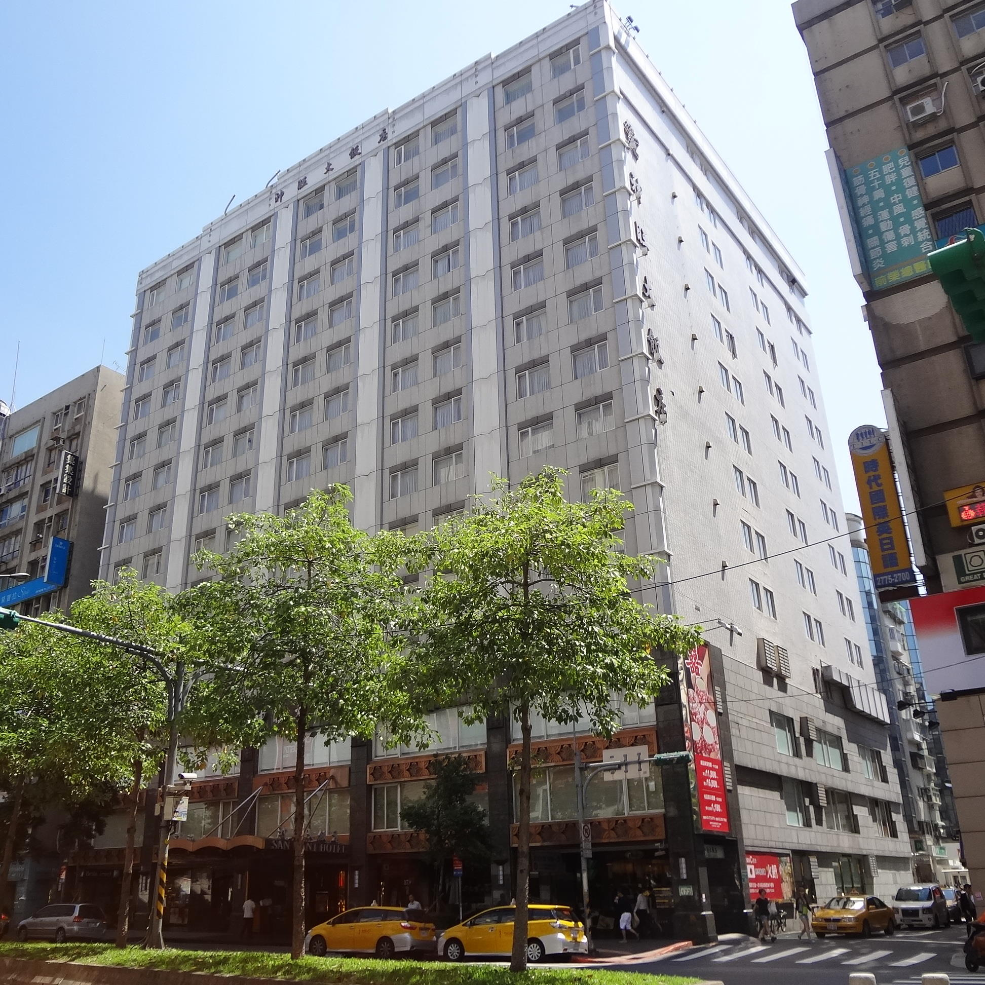 台北神旺大飯店，地址：臺北市大安區忠孝東路四段172號。